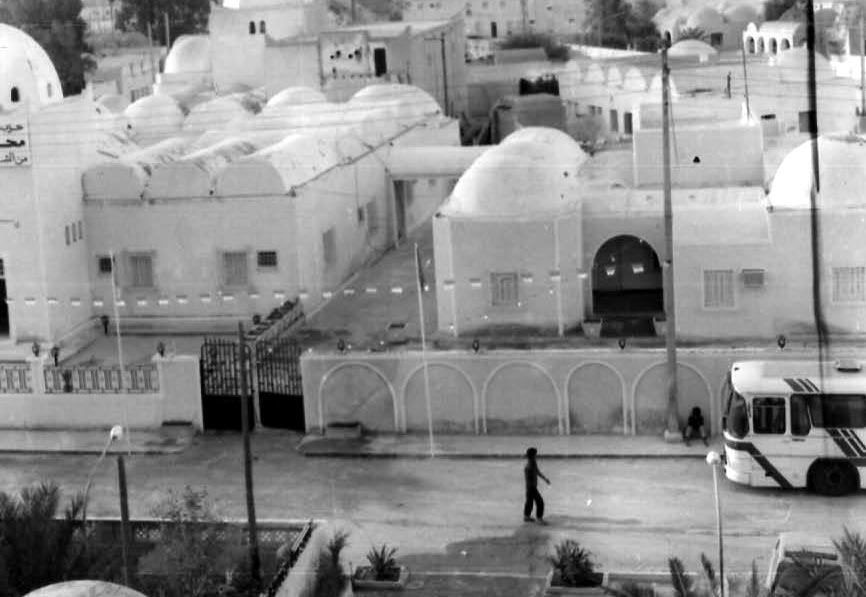 Rue d'El oued